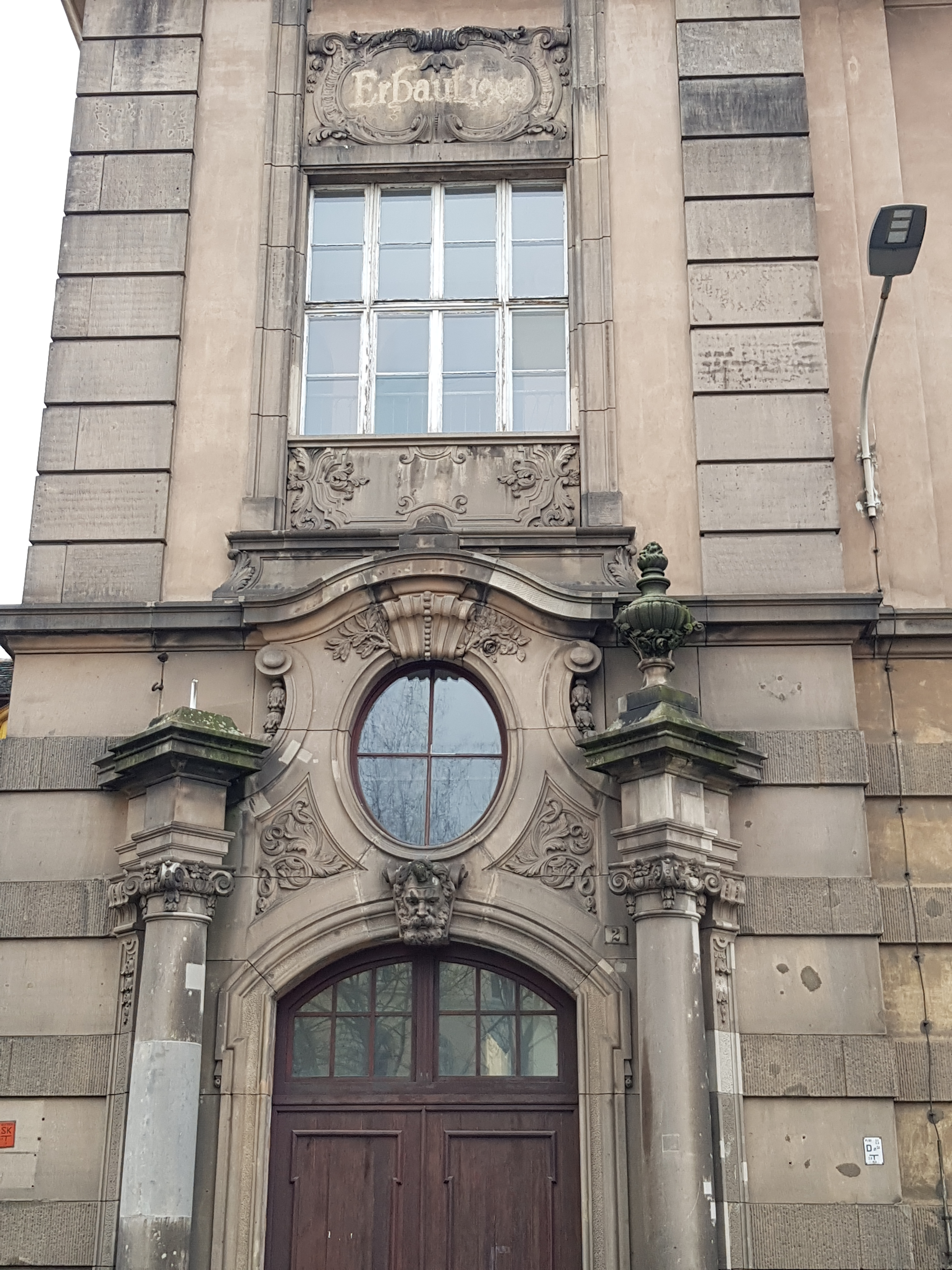 Ruiny budynku dawnej Poczty Paczkowej we wrocławiu przy ulicy Purkyniego 2 (fragment)